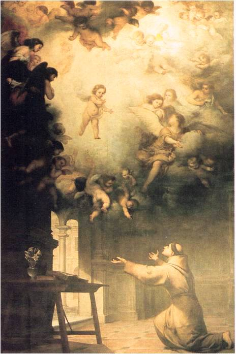 Esta obra, que preside el retablo de la capilla de San Antonio de la catedral de Sevilla, (España), fue pintada en 1656 por el célebre pintor Bartolomé Esteban Murillo.